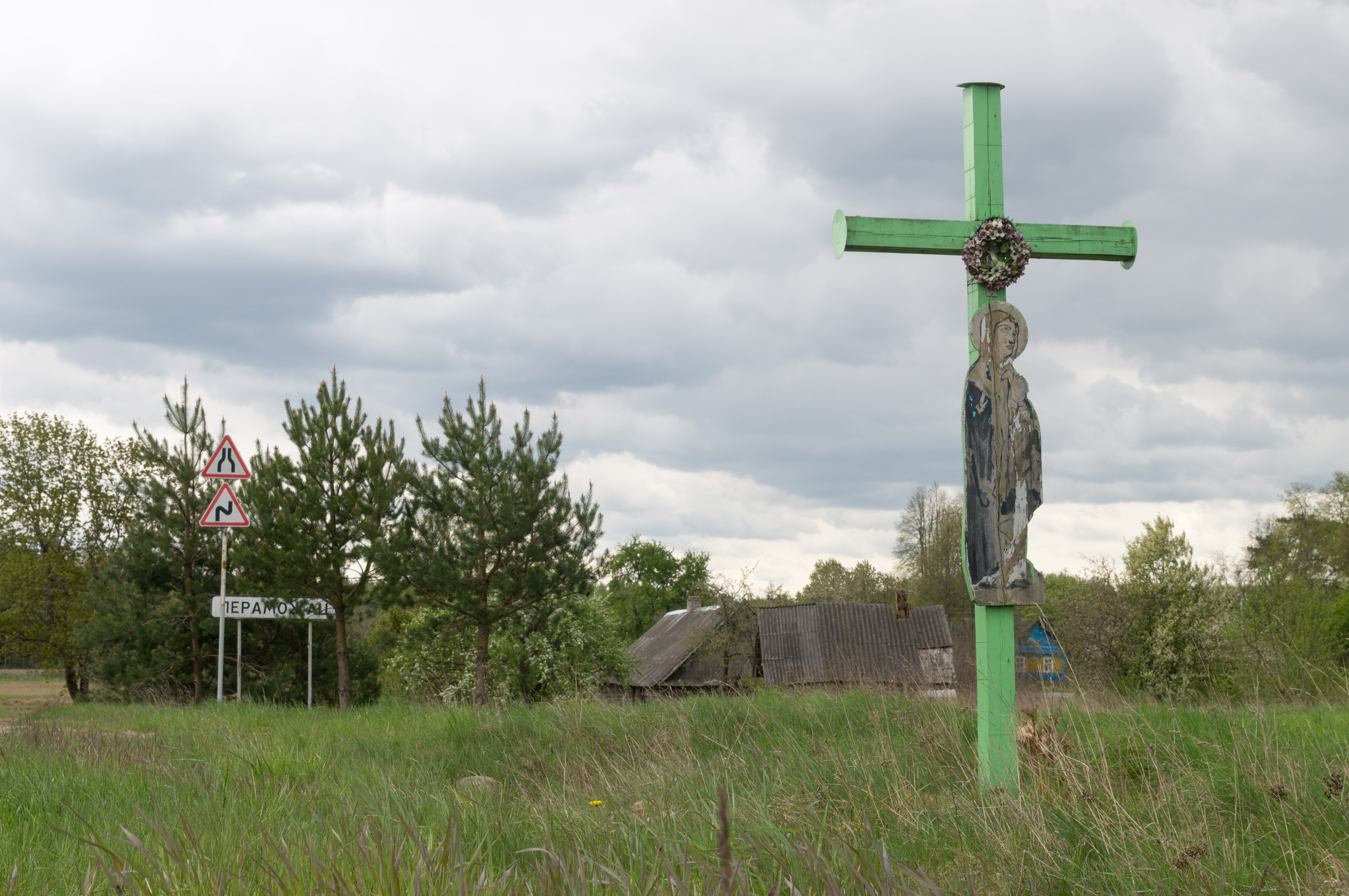 Пераможац_Пабядзіцель_Сморкава